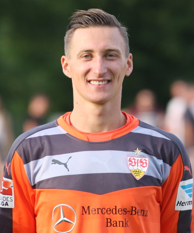 Przemyslaw Tyton beim VfB-Saisonauftakt 2015/16. Aufgenommen von